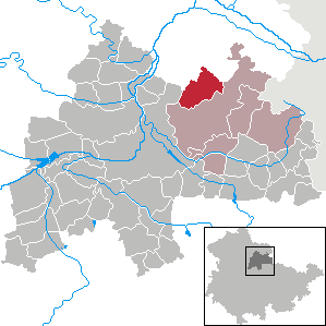 Beichlingen in Thüringen, Landkreis Sömmerda